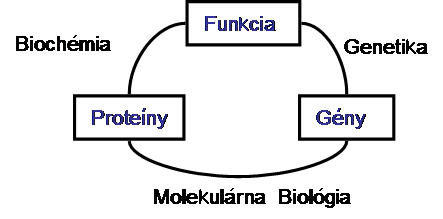 Schematické vzťahy medzi biochémiou, genetikou a molekulárnou biológiou 10.9.2005 Fluktuacia Kategória:Obrázky schém